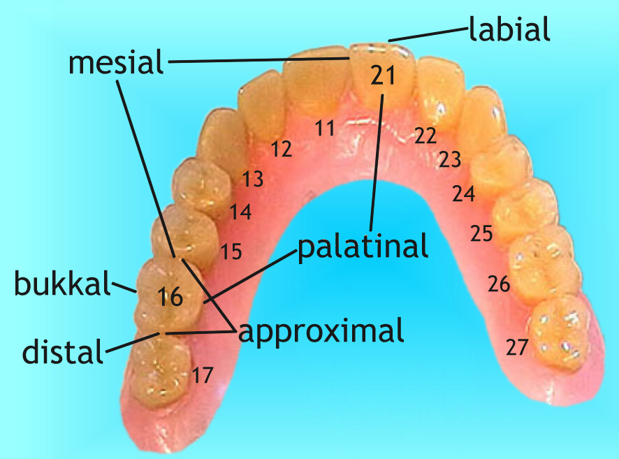 Lage- und Verhältnisbezeichnungen am Zahn